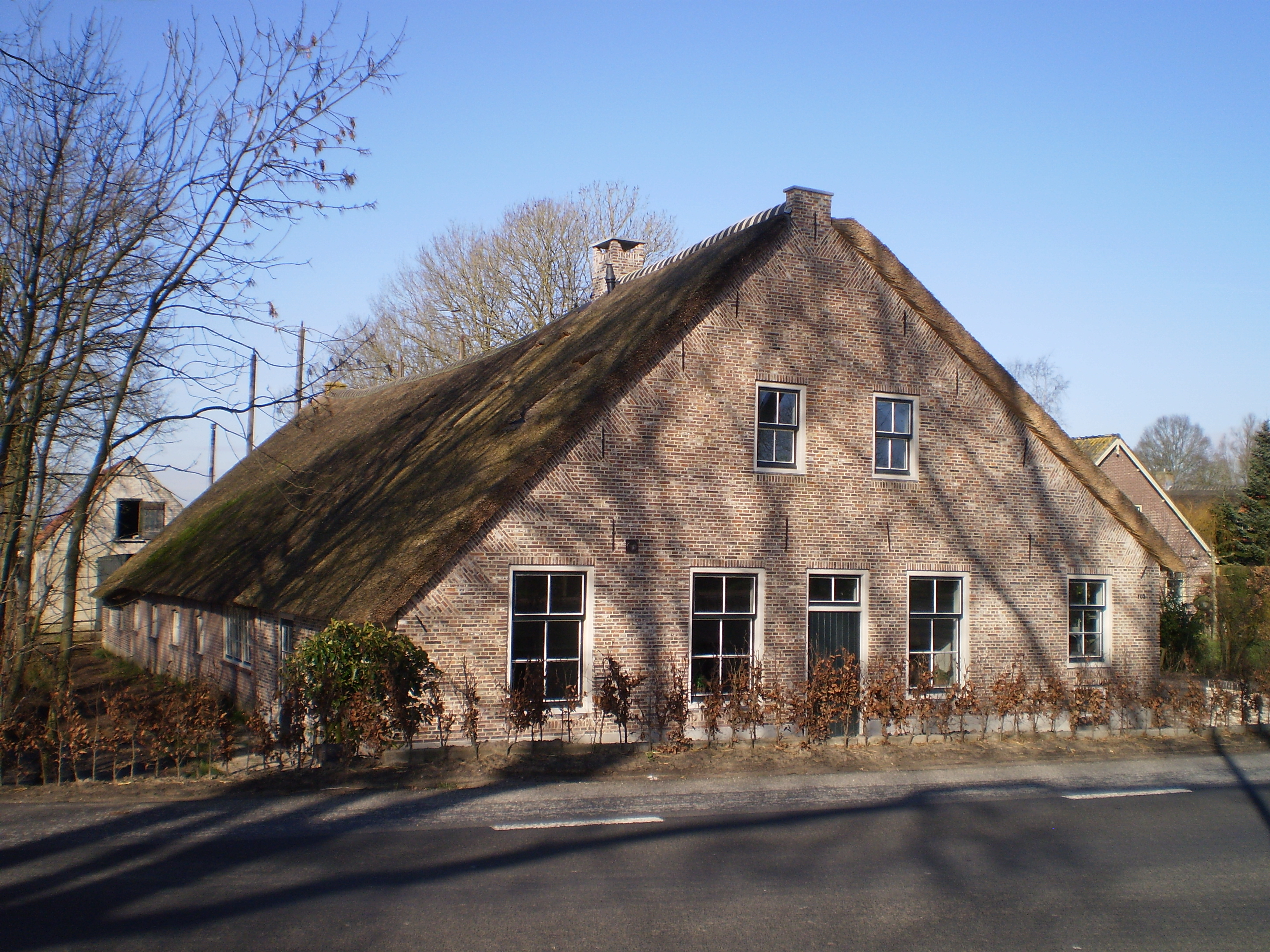 Eemnes Wakkerendijk 24 op 4 maart 2014